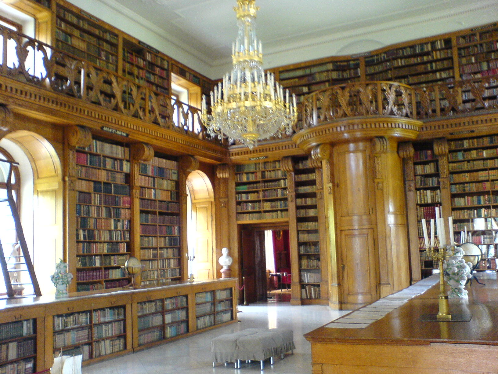 Festetics-kastélyegyüttes – kastélymúzeum This is a photo of a monument in Hungary. Identifier: 10876